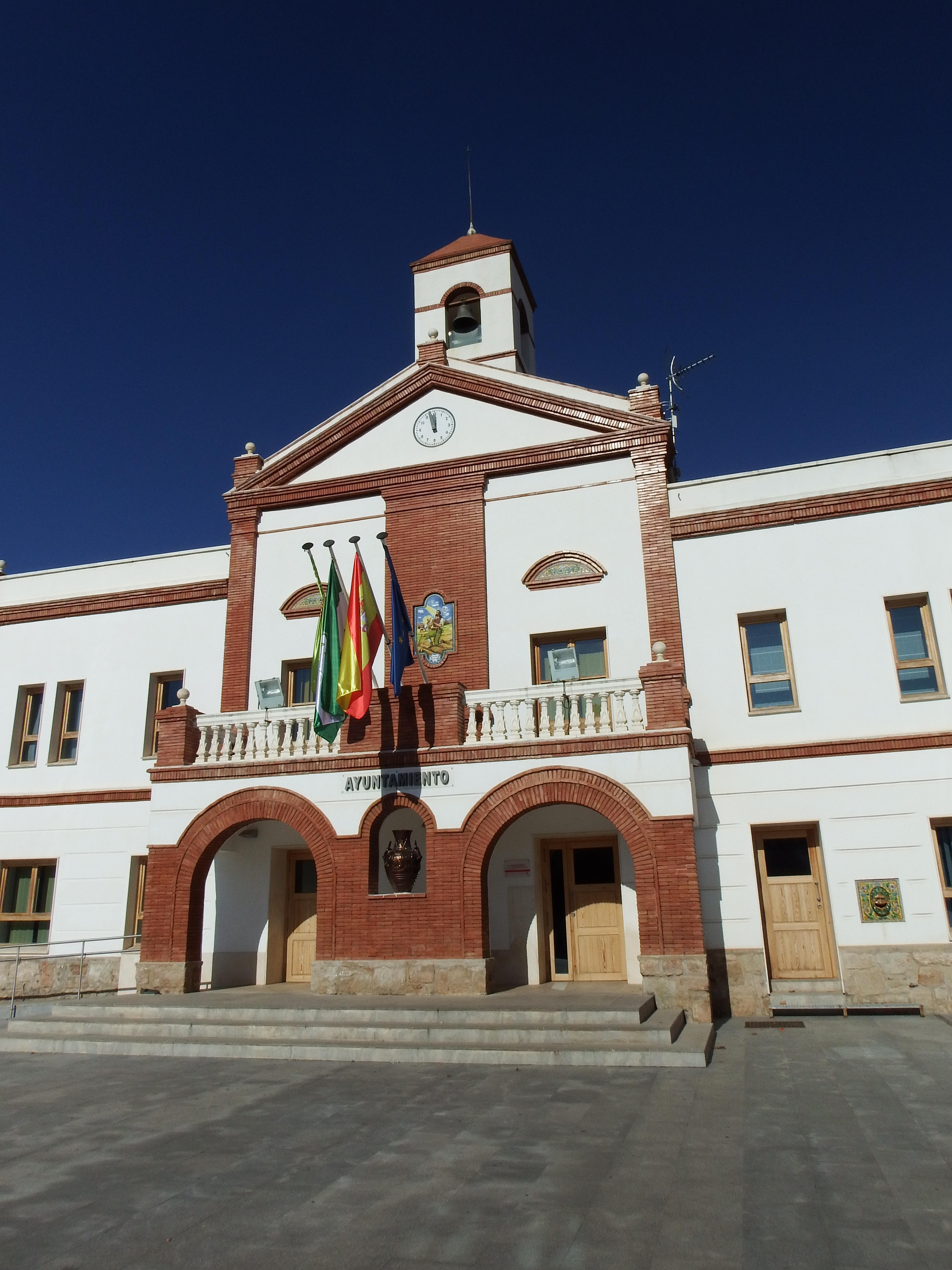 Puente de Génave